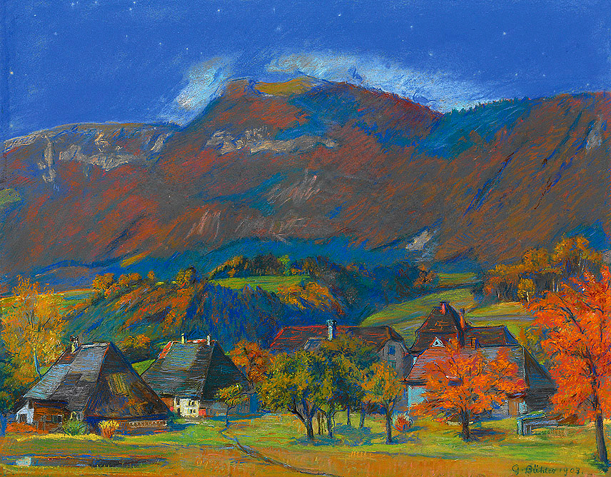 Blick auf Weißenstein im Schweizer Jura